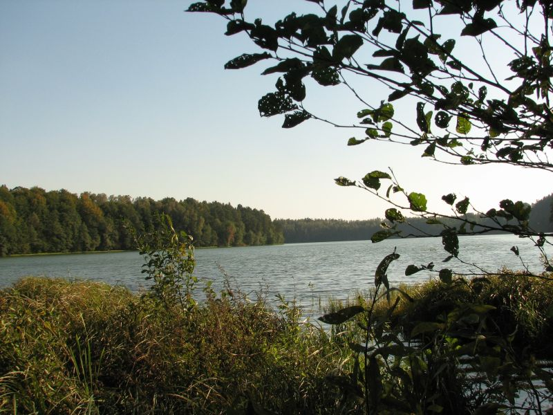 Ładny widok